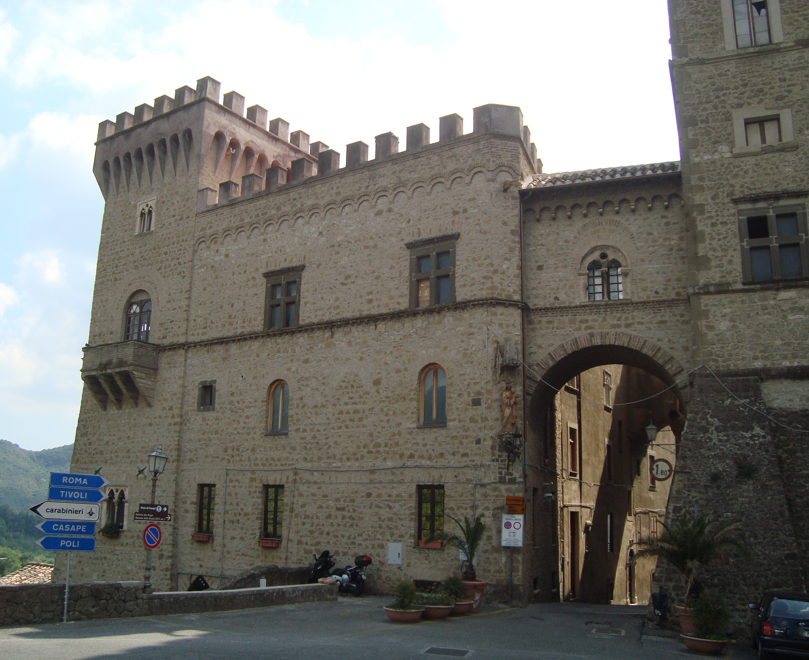 Vue de l'entrée du Castello Brancaccio à San Gregorio da Sassola